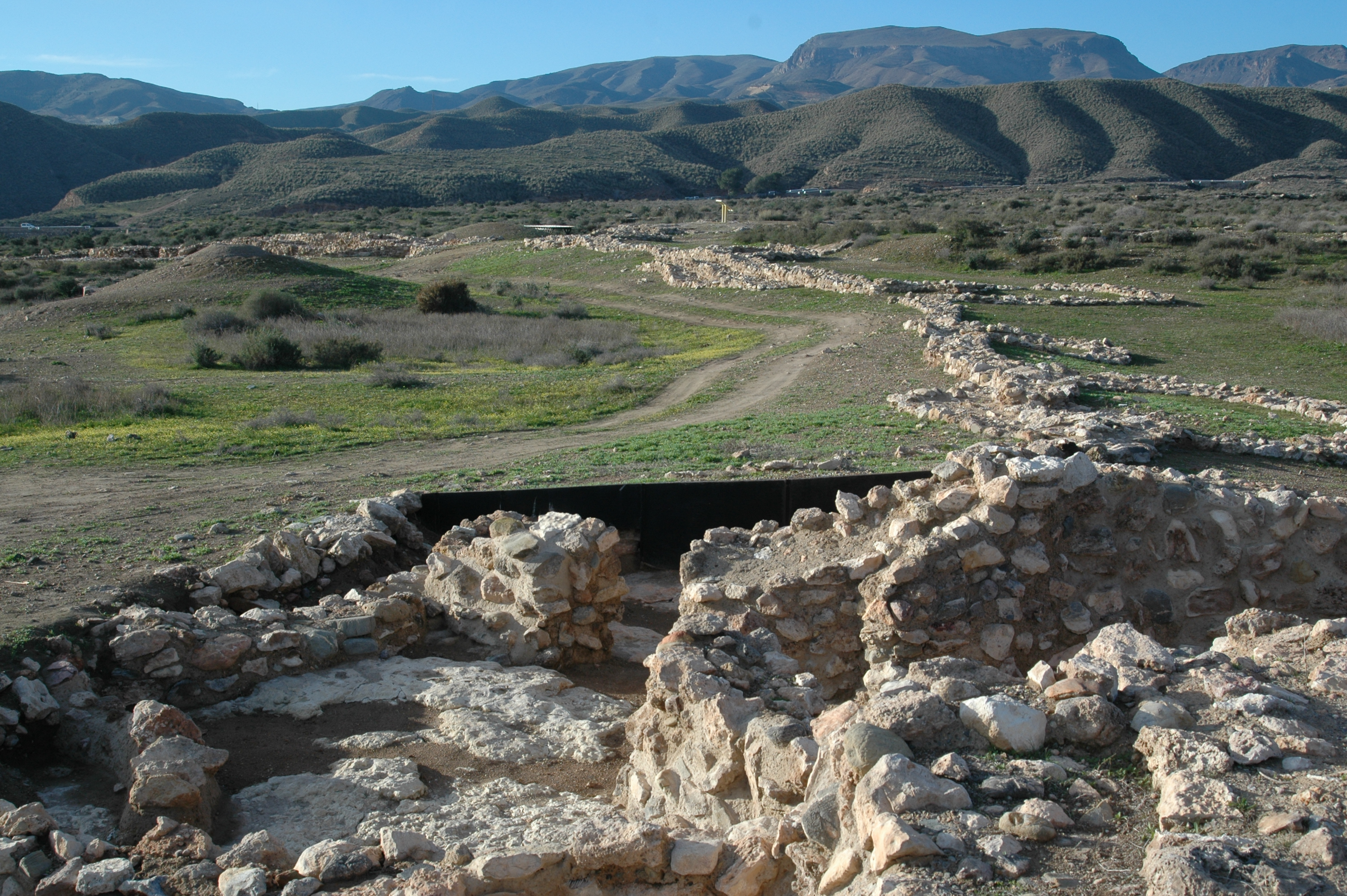 Enclave Arqueológido de Los Millares. Línea I del poblado vista desde la zona norte